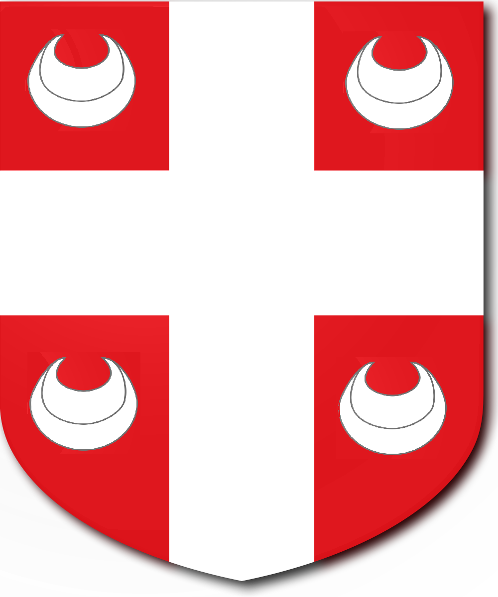 Dubouays de la Bégassière